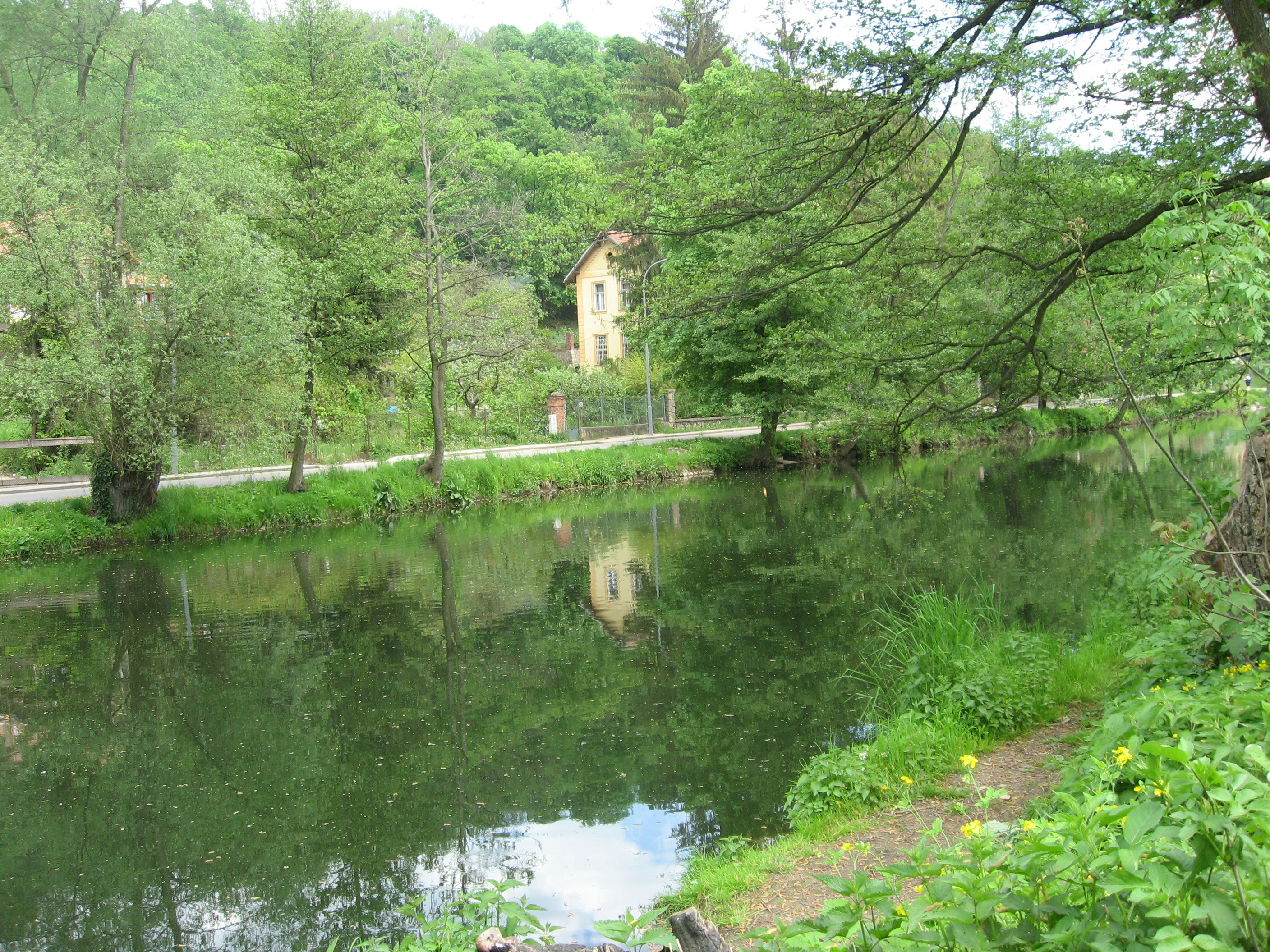 Svitava v Obřanech